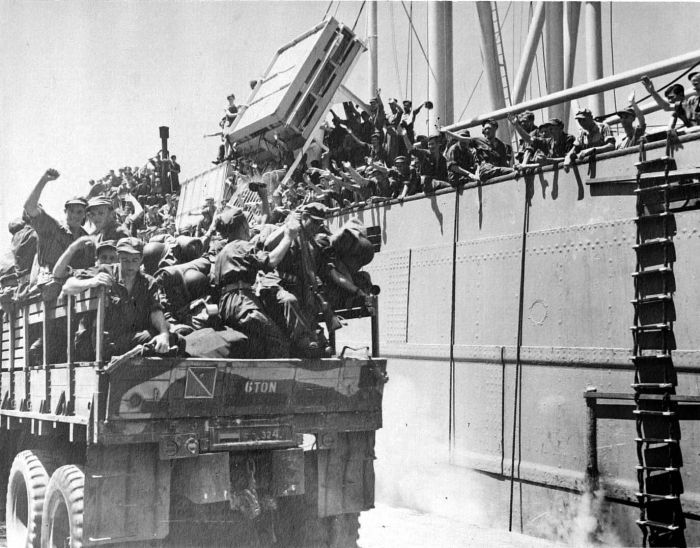 Repronegatief. Het derde Bataljon debarkeert te Makassar Unknown language: Het 3eBat. debarkeert te Makassar.